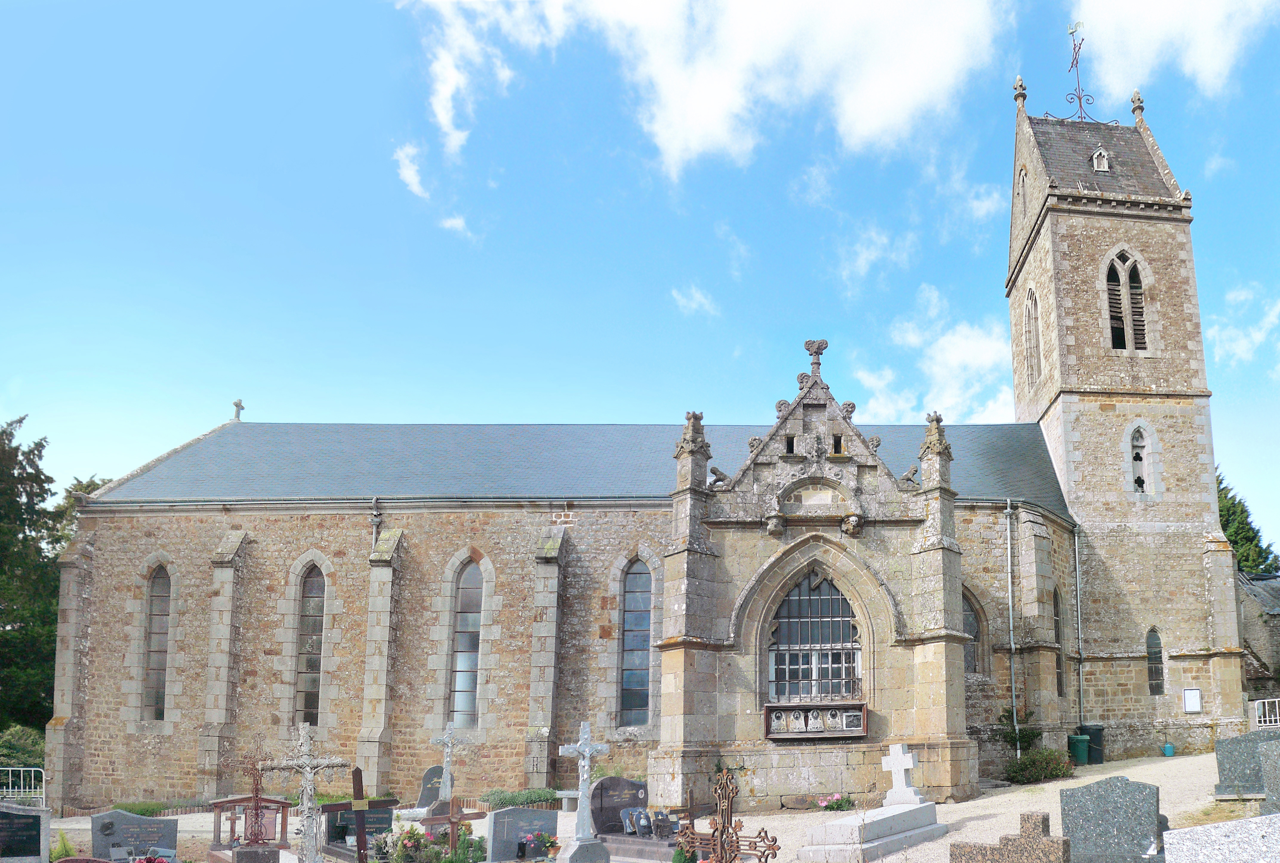 Église Saint-Pierre et Saint-Paul de Bréel, dans l'Orne.